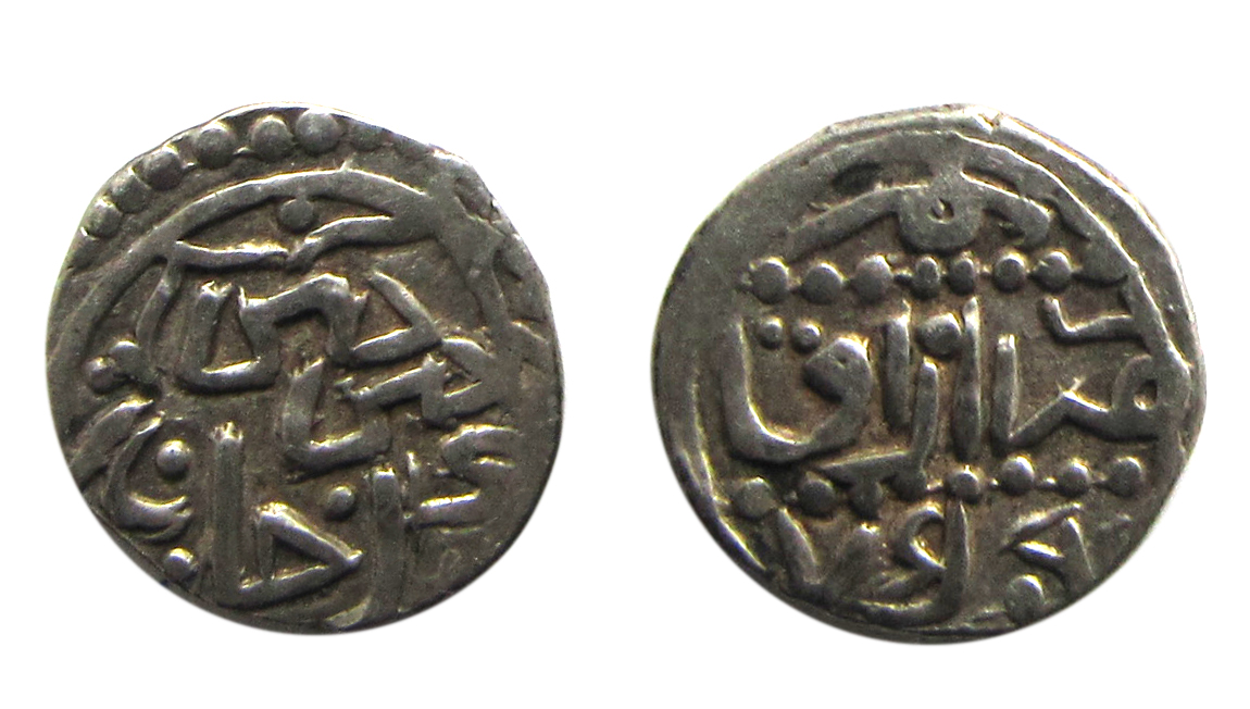 Найден в 2010 году в составе большого клада на территории Воронежской области